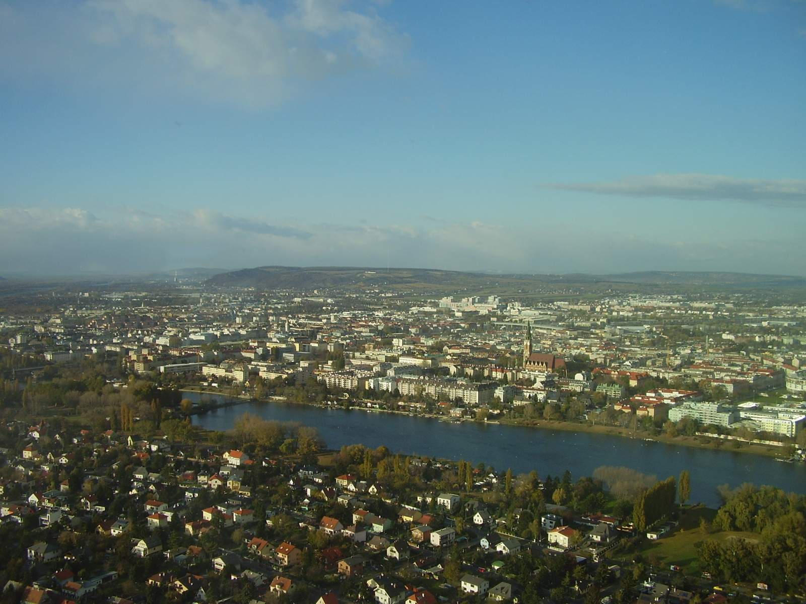 Vienna 2 november 2006